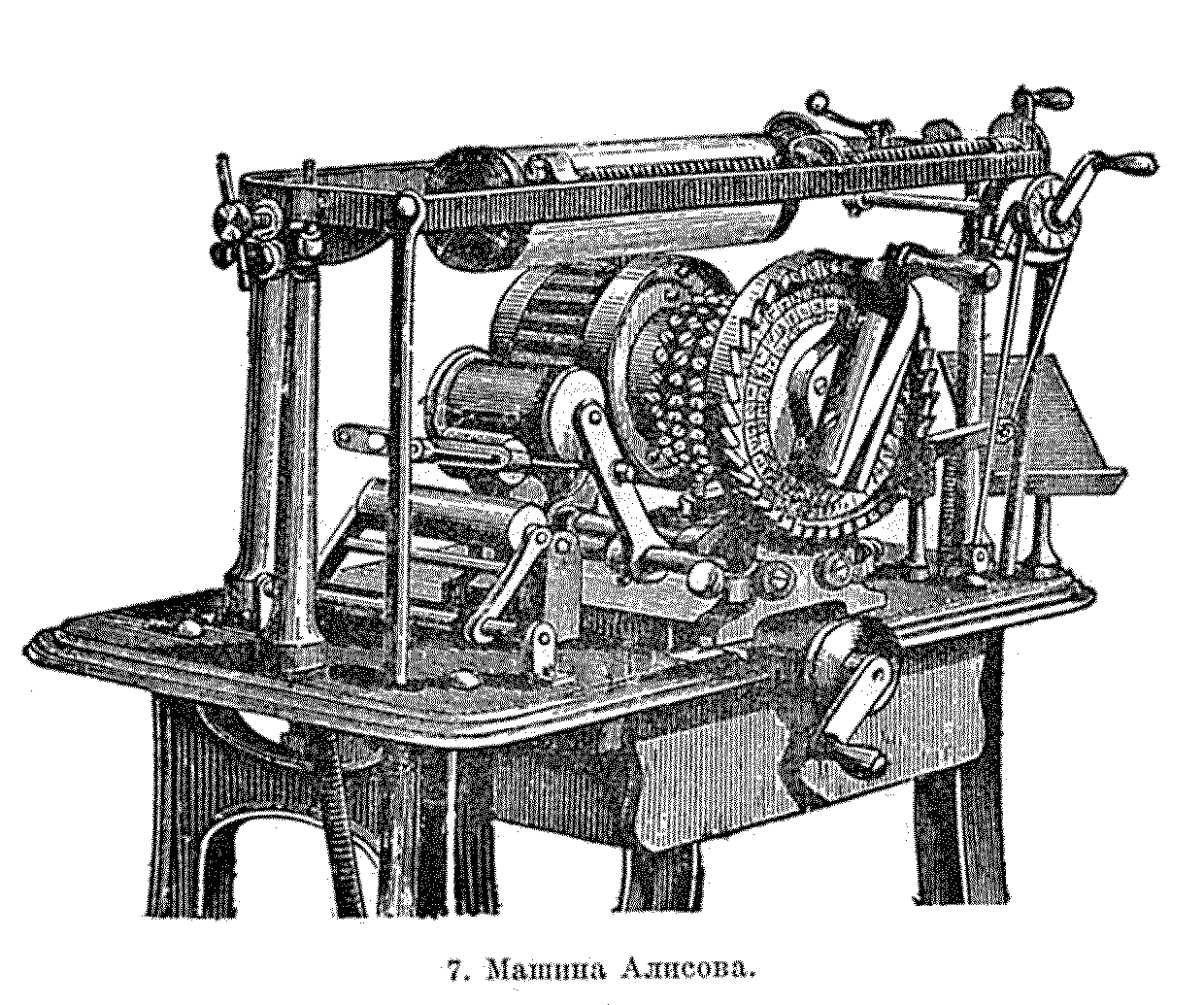 "Скоропечатник" или "Скорописец" - пишущая машинка Михаила Ивановича Алисова 1870 год. Иллюстрация из энциклопедического словаря Брокгауза и Ефрона (1890—1907)